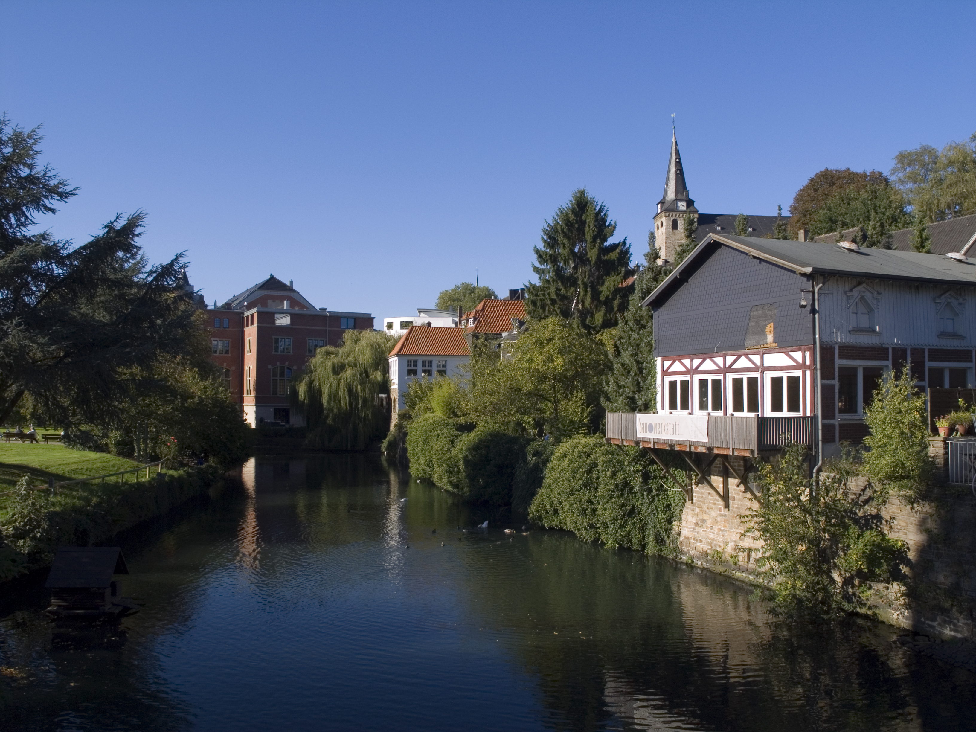 Северный Рейн - Вестфалия, Эссен, Кеттвиг - Мельничный ров